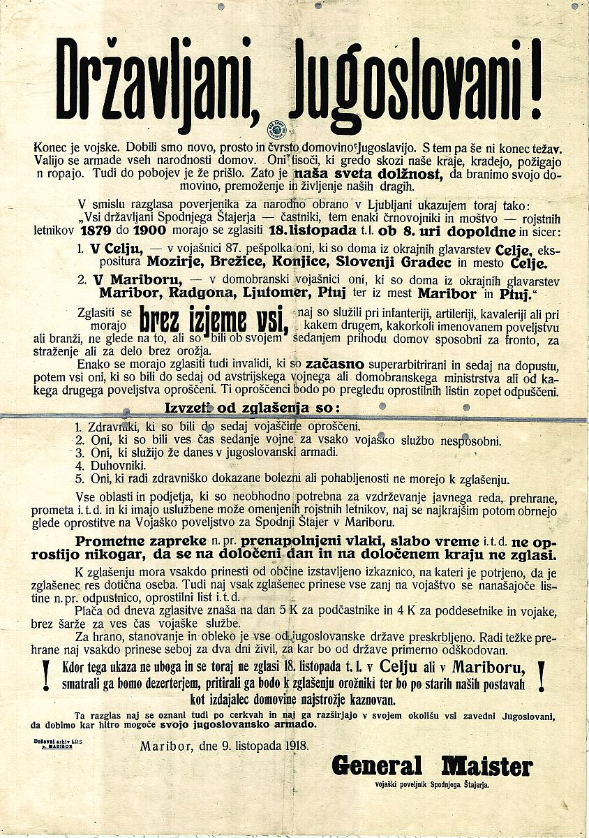 Rudolf Maister je 9. novembra 1918 izdal razglas o mobilizaciji. Protestirali so tako v Nemški Avstriji kot Narodna vlada v Ljubljani. Kljub protestom je mobilizacija uspela